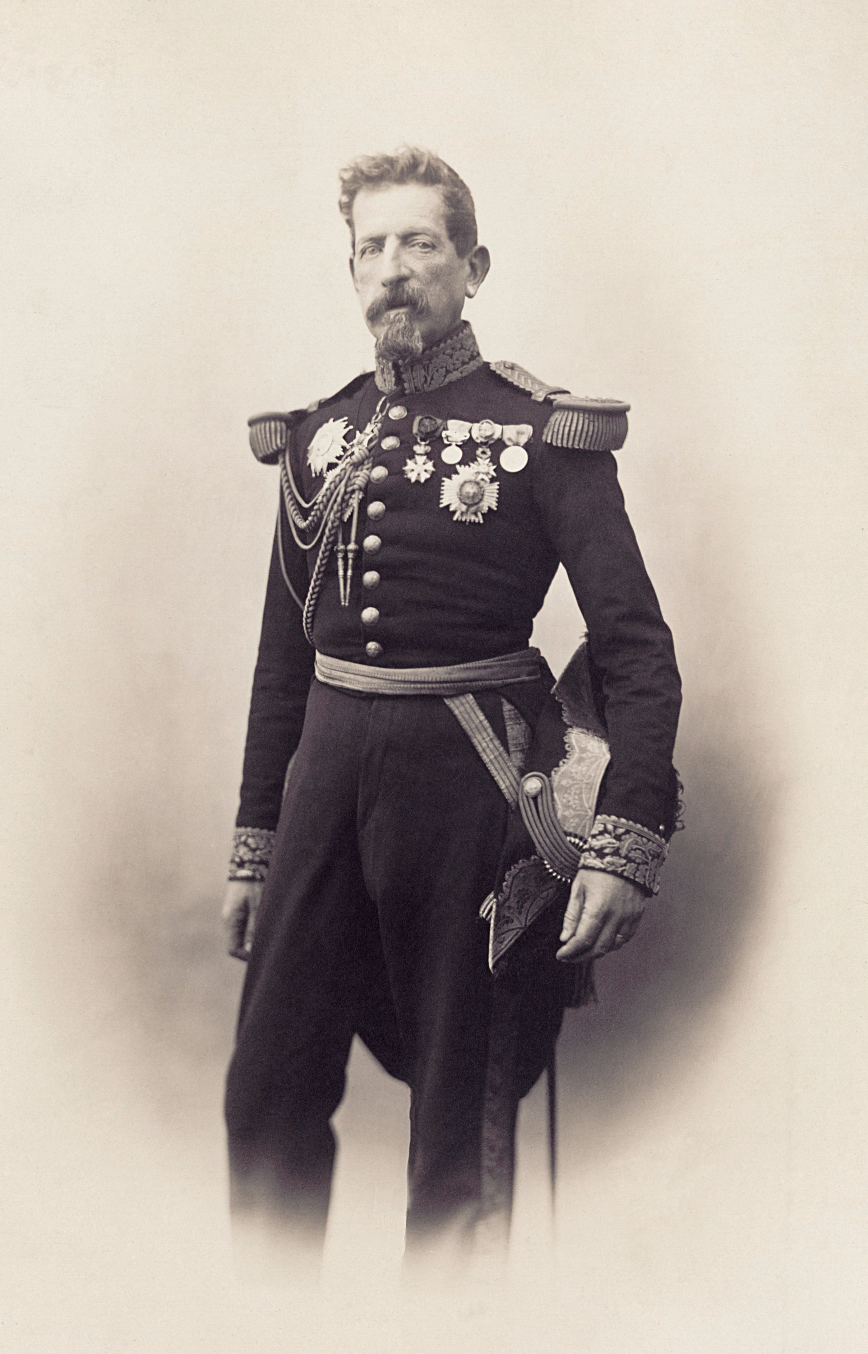 Émile Mellinet (1798 - 1894), général d'infanterie français. 1 photographie positive sur papier albuminé, d'après négatif sur plaque de verre au collodion ; 33,5 x 24 cm.